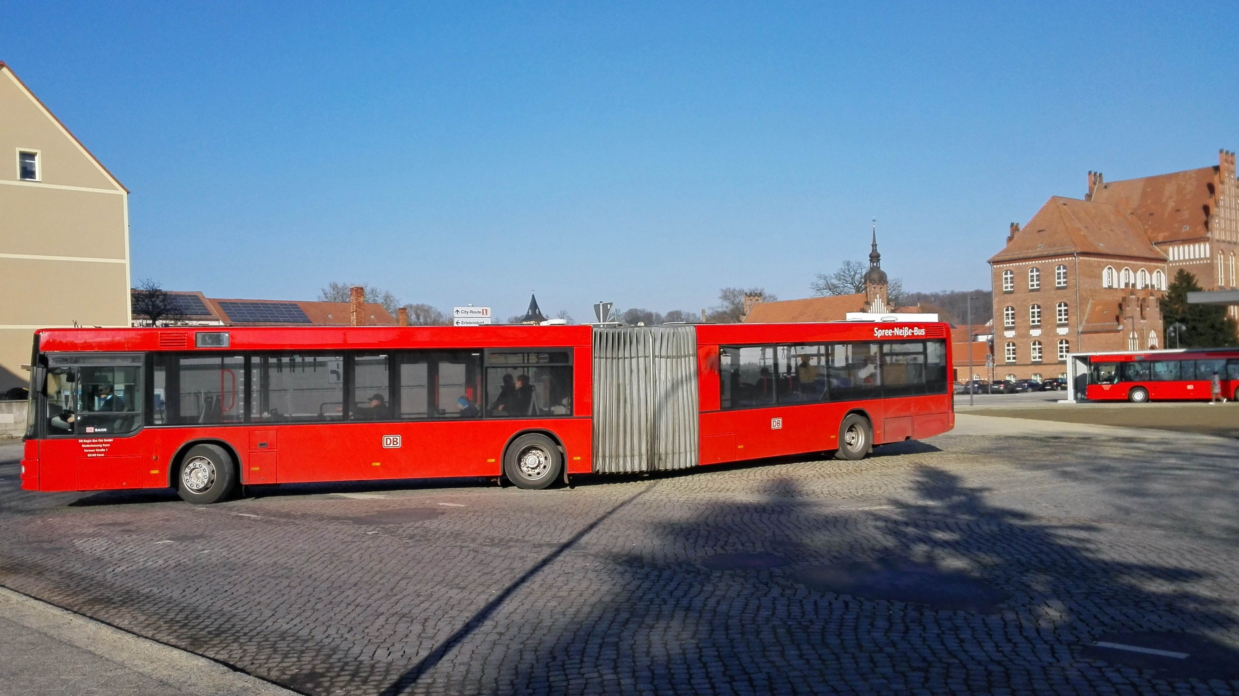 Spree-Neiße-Bus der Deutsche Bahn Regio Bus Ost GmbH, hier bei der Ausfahrt aus dem Busbahnhof in Spremberg.